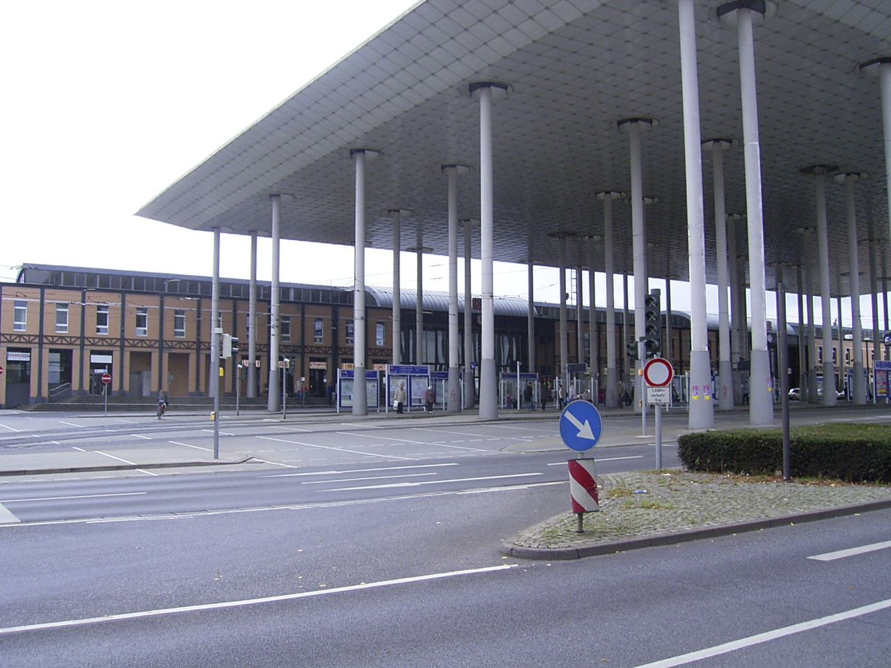 Bahnhof Kassel-Wilhelmshöhe